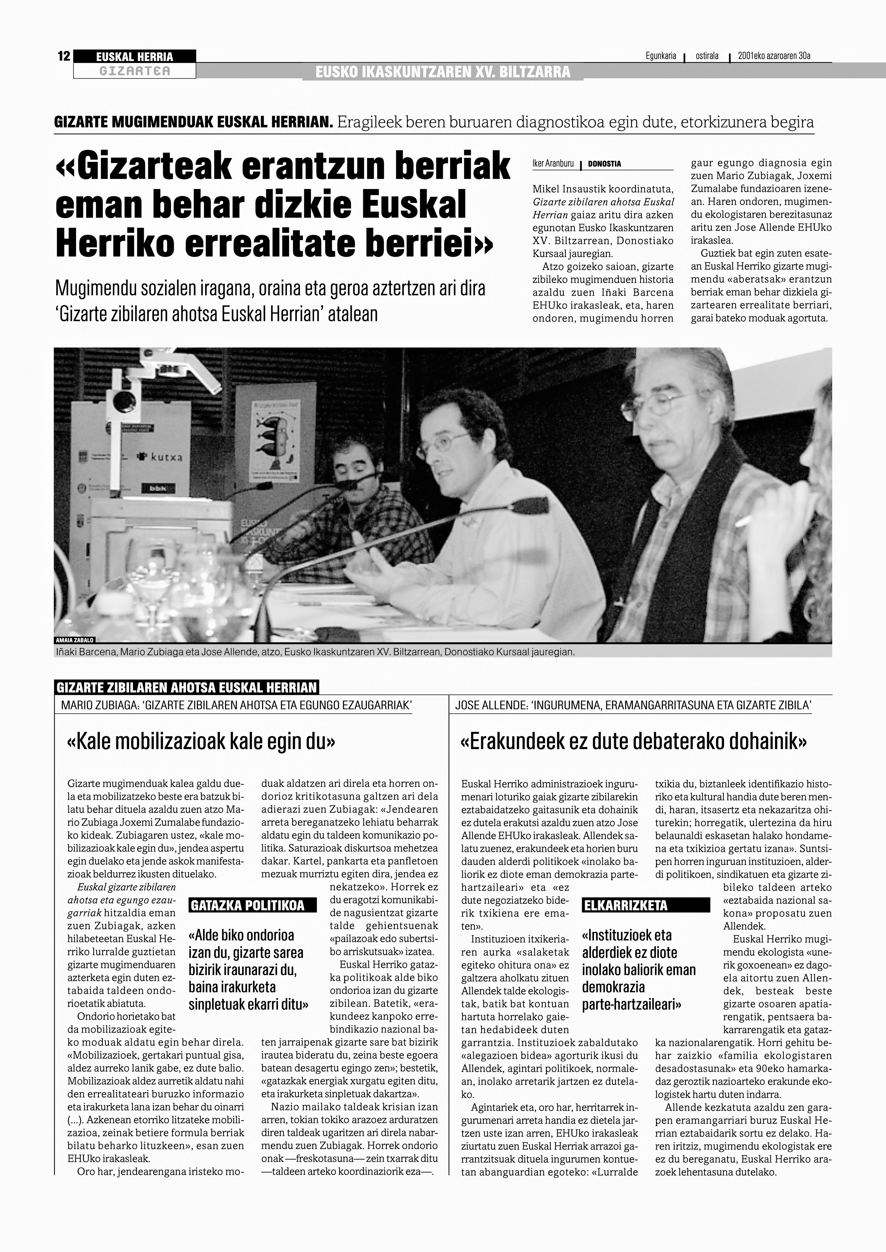 Mario Zubiaga eta Jose Allende (Euskaldunon Egunkaria, 2001) "Gizarteak erantzun berriak eman behar dizkie Euskal Herriko errealitate berriei"